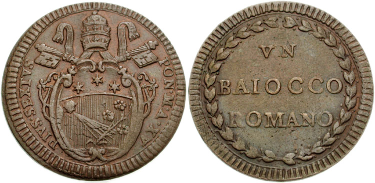 Italia, Stato Pontificio. Pio VI. 1775-1799. Æ Baiocco (33mm, 11.49 g). zecca di Roma. Datato Anno XV (1789). Stemma pontificio, PIVS•SEXTVS PON•M•A•XV Denominazione: VN BAIOCCO ROMANO. Italy, Papal States. Pius VI. 1775-1799. Æ Baiocco (33mm, 11.49 g). Rome mint. Dated RY 15 (1789). Papal coat-of-arms. PIVS•SEXTVS PON•M•A•XV Denomination: VN BAIOCCO ROMANO. KM 1222.